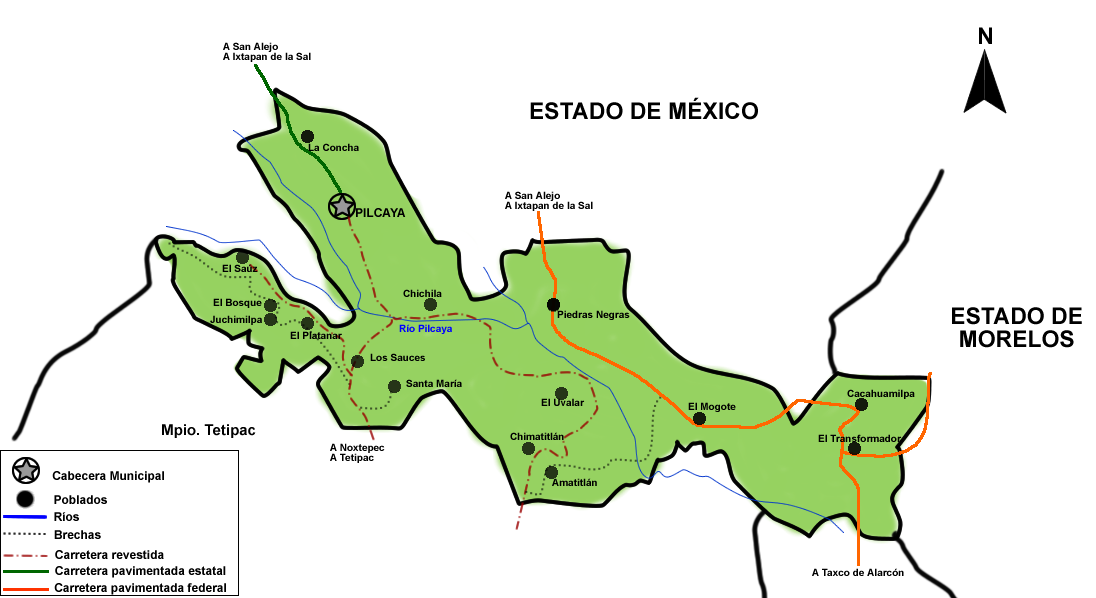 Ubicación geográfica del Municipio de Pilcaya, Estado de Guerrero, México